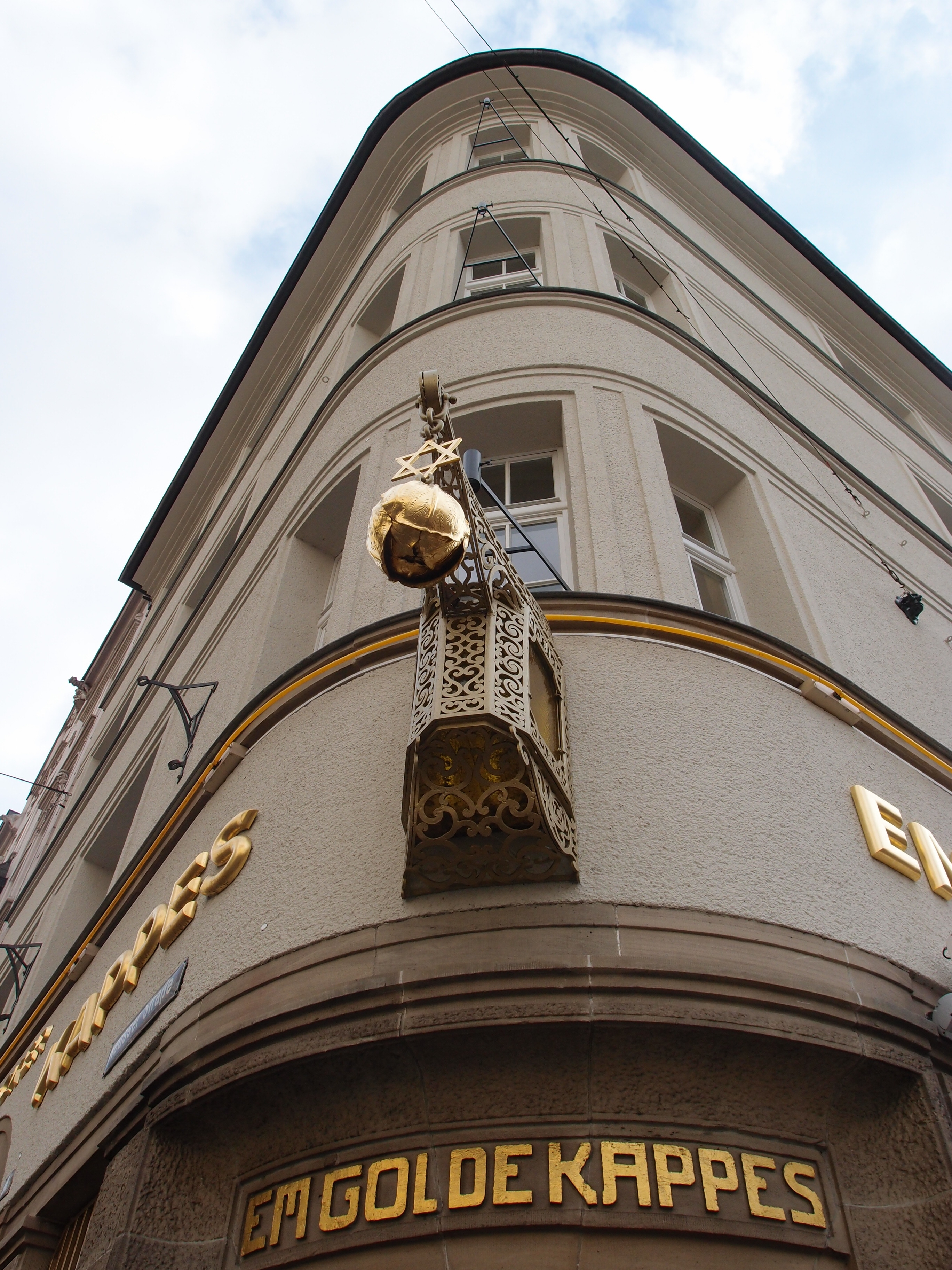 Brauhaus (Früh) "Em Golde Kappes" (in: Köln-Nippes) - Detailansicht Datum: 30.03.2012 Urheber: M. Pfeiffer alias Gordito1869 Quelle: Privates Fotoarchiv des Urhebers